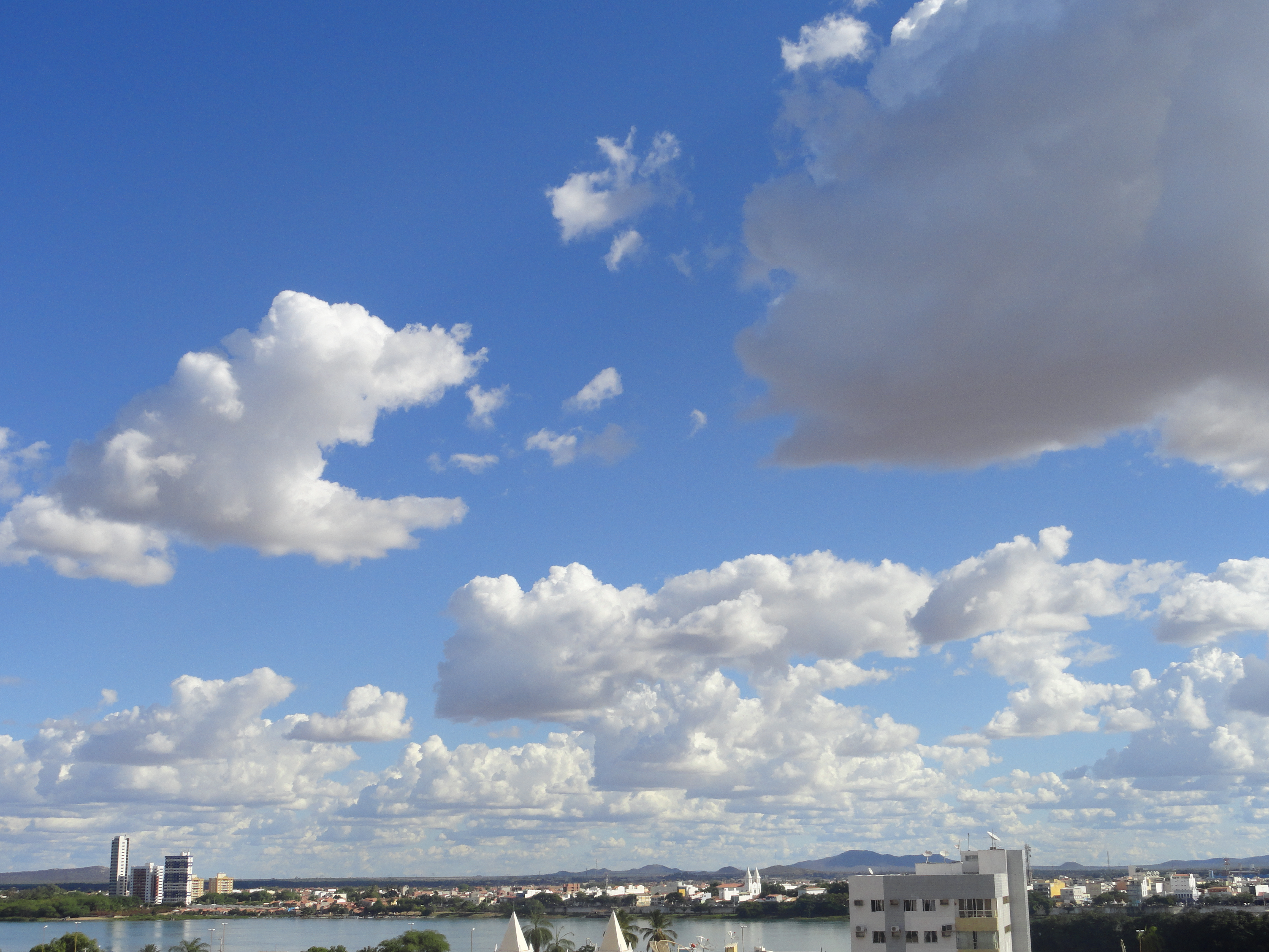 Juazeiro (Bahia)